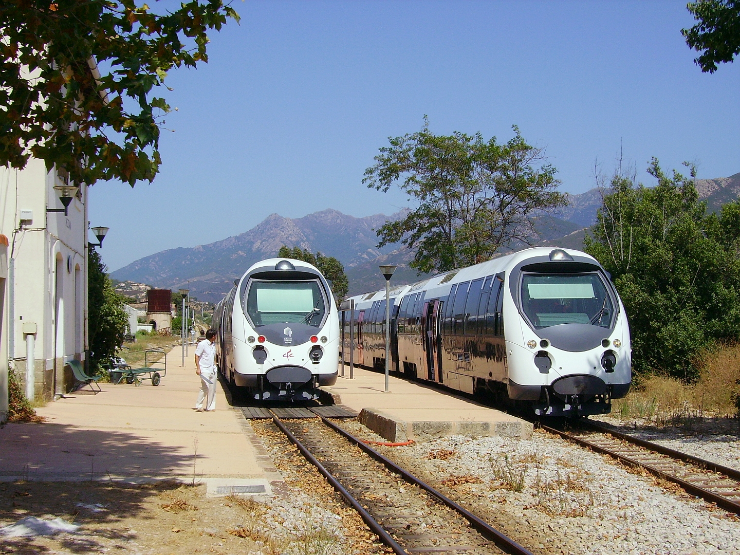 En gare de Mezzana, croisement des trains 26 et 77 le 27/07/09.